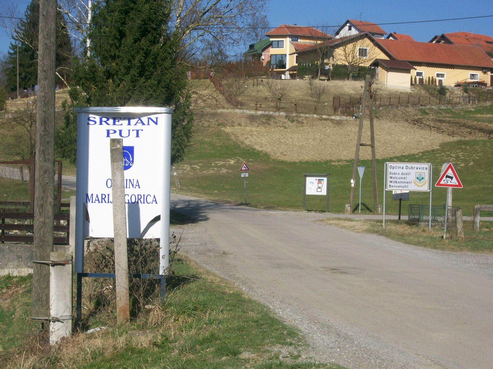 Kraj Gornji na granici općine Marija Gorica i Dubravica